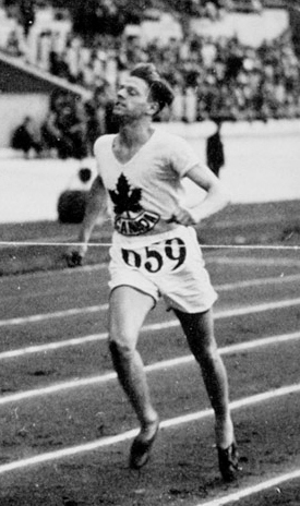 Olympische Spelen 1928 Amsterdam, Nederland : de Canadees F.W. MacBeth jr.